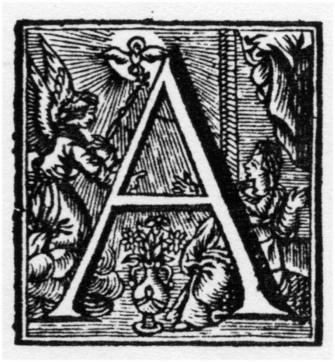 ornamental letter (A)